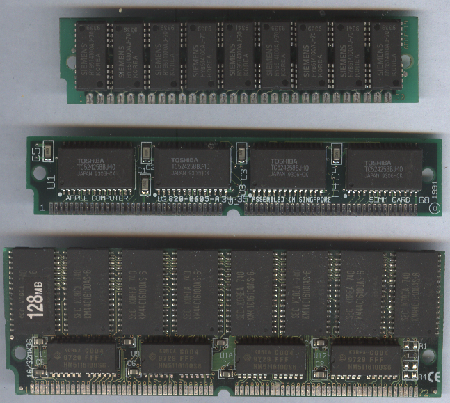 SIMMs de 30 contactos (4 MB, 9 x HYB514100AJ-70), 68 contactos (VRAM de un Macintosh LC II 512 KB 4 x TC524258BJ-10) y 72 contactos (doble cara 128 MB 16 x KM44C16100AS-6 + 8 x HM5116100S6)